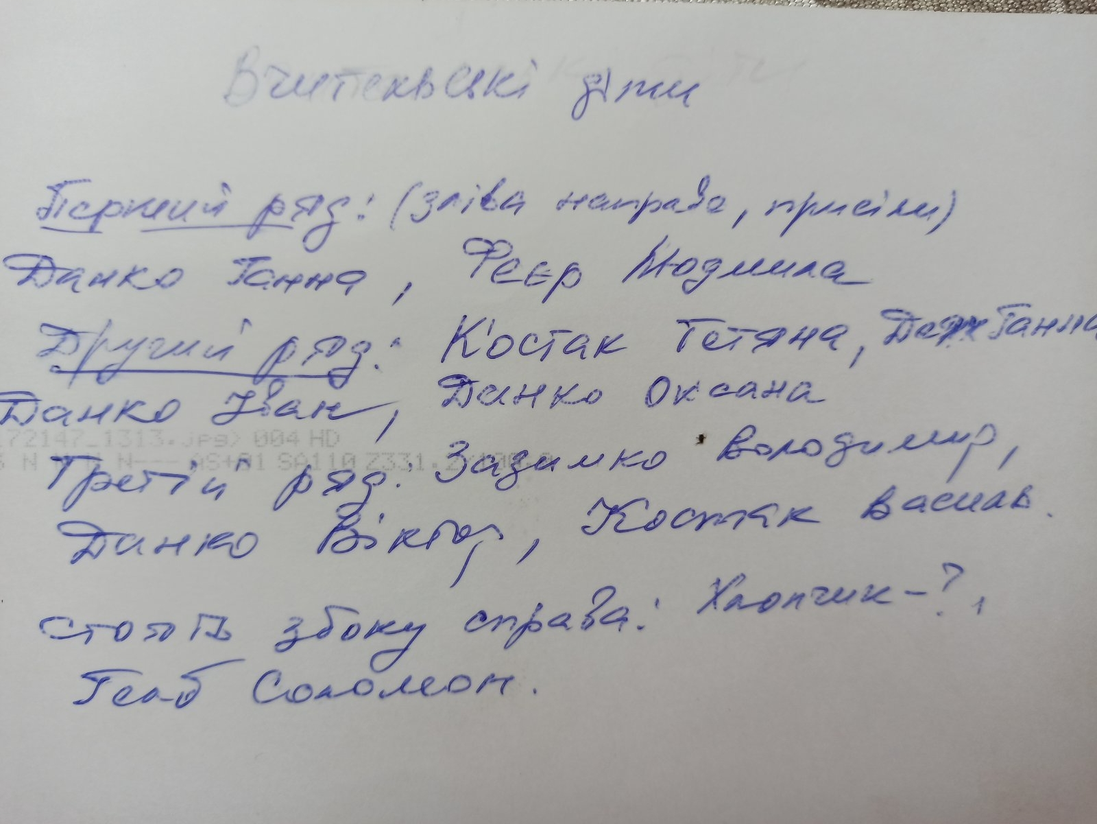 підписи фото дітей вчителів з села Онок Закарпатська область підписані